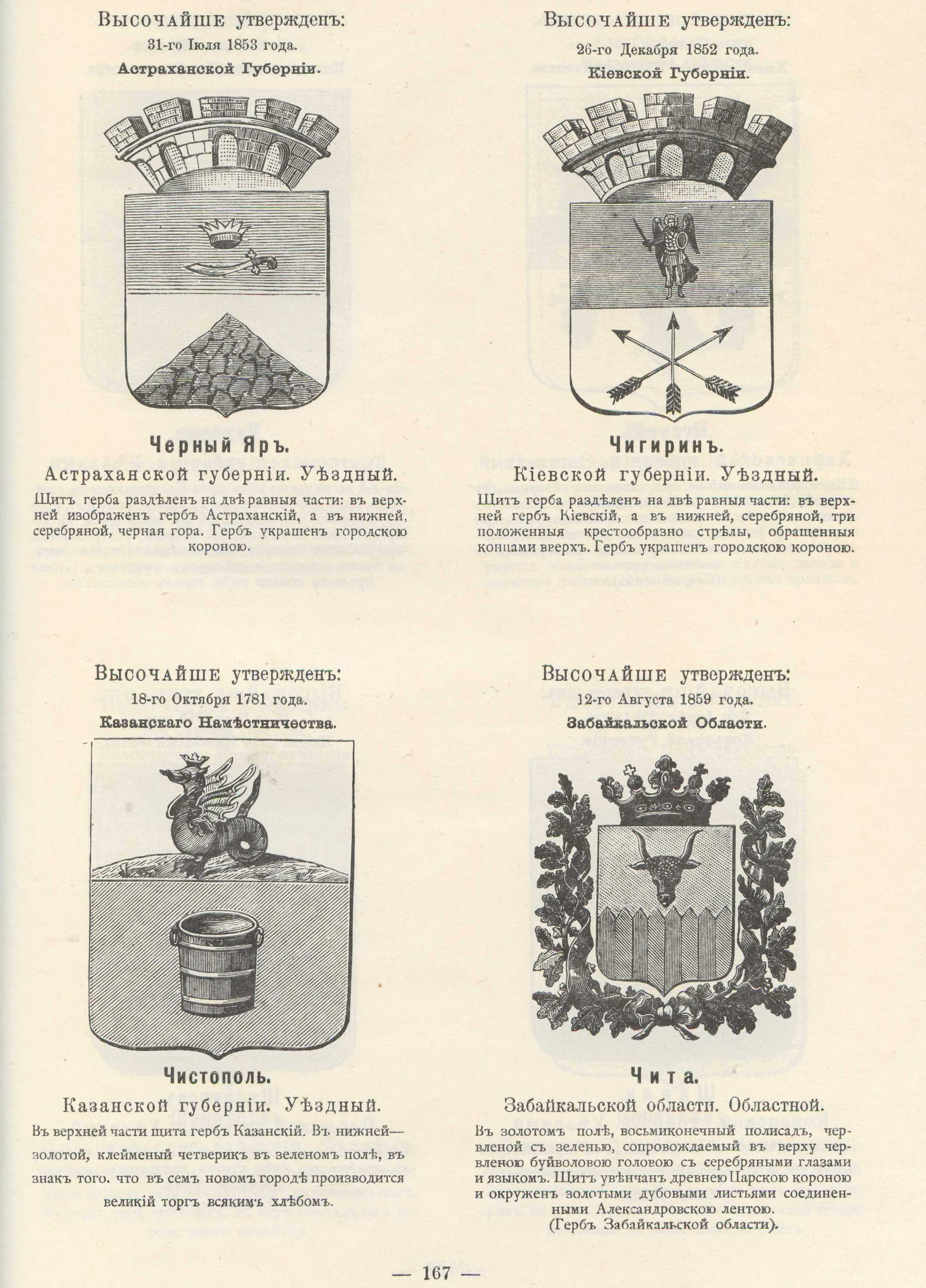 Official Russian Empire coats of arms. Гербы городов Российской Империи: Черный Яр Чигирин Чистополь Чита с официальными описаниями в Гербовнике Винклера.